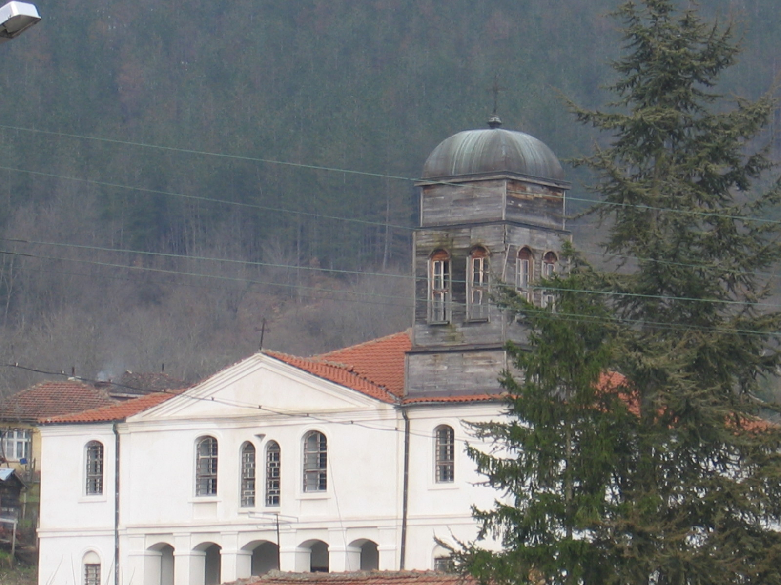 Църквата "Св. св. Кирил и Методий" в село Кости; © 2006 Зорница Йорданова Храмът в село Кости притежава изключителна историческа, културна и духовна стойност. В него се съхраняват уникални православни икони с гръцки произход, като повечето от тях датират от времето на Българското възраждането.